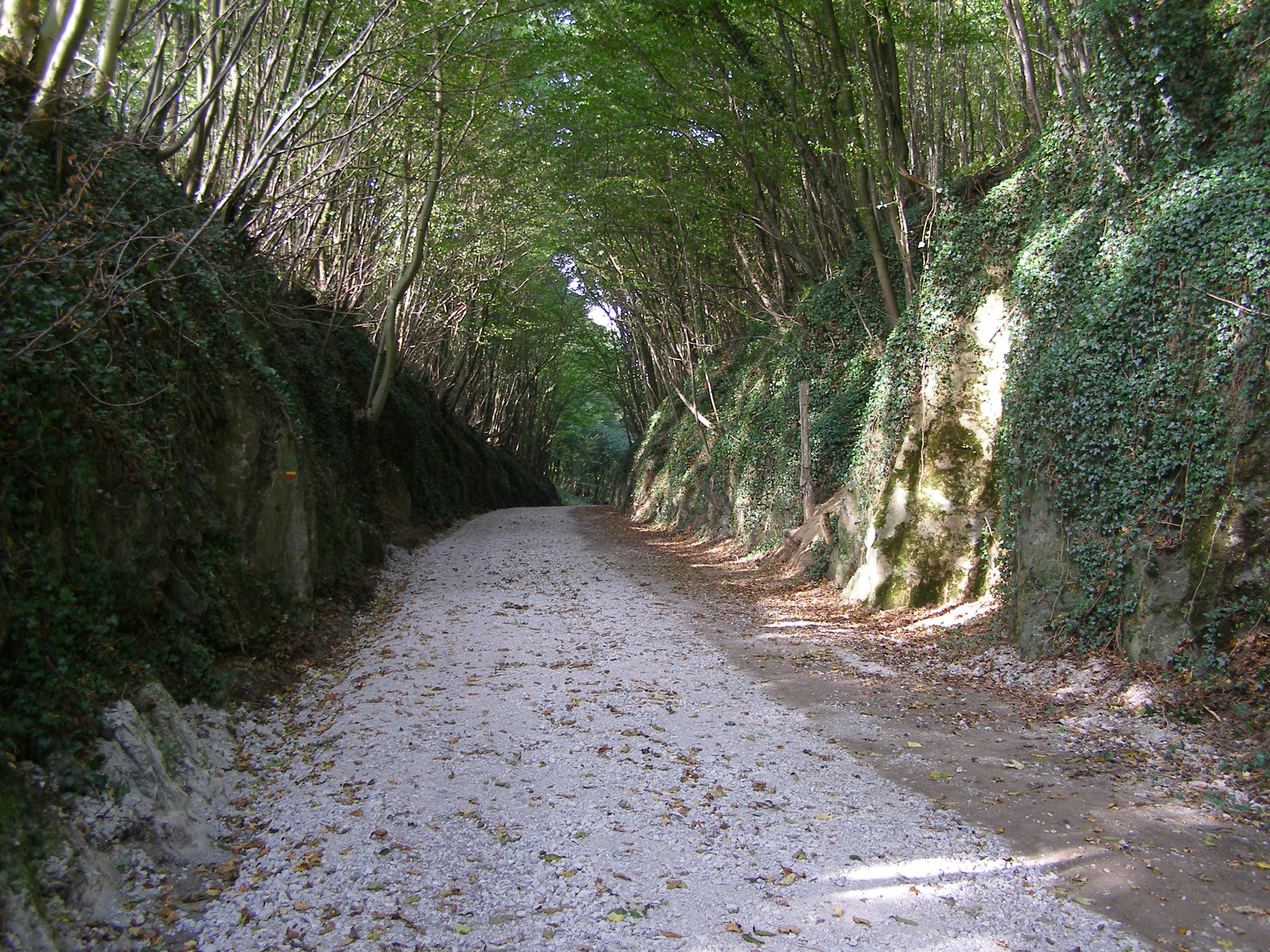 Voute boisée sur le sentier émeraude.